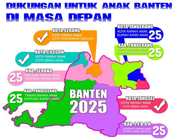 Menuju Banten Ramah Anak 2025